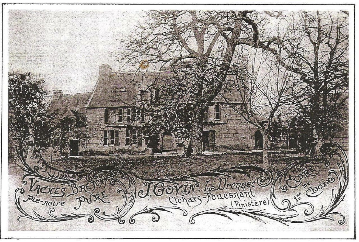 Clohars-Fouesnant : carte postale publicitaire du début XXème siècle, éditée par M. Govin, propriétaire, éleveur et cidrier et représentant son manoir du Drennec